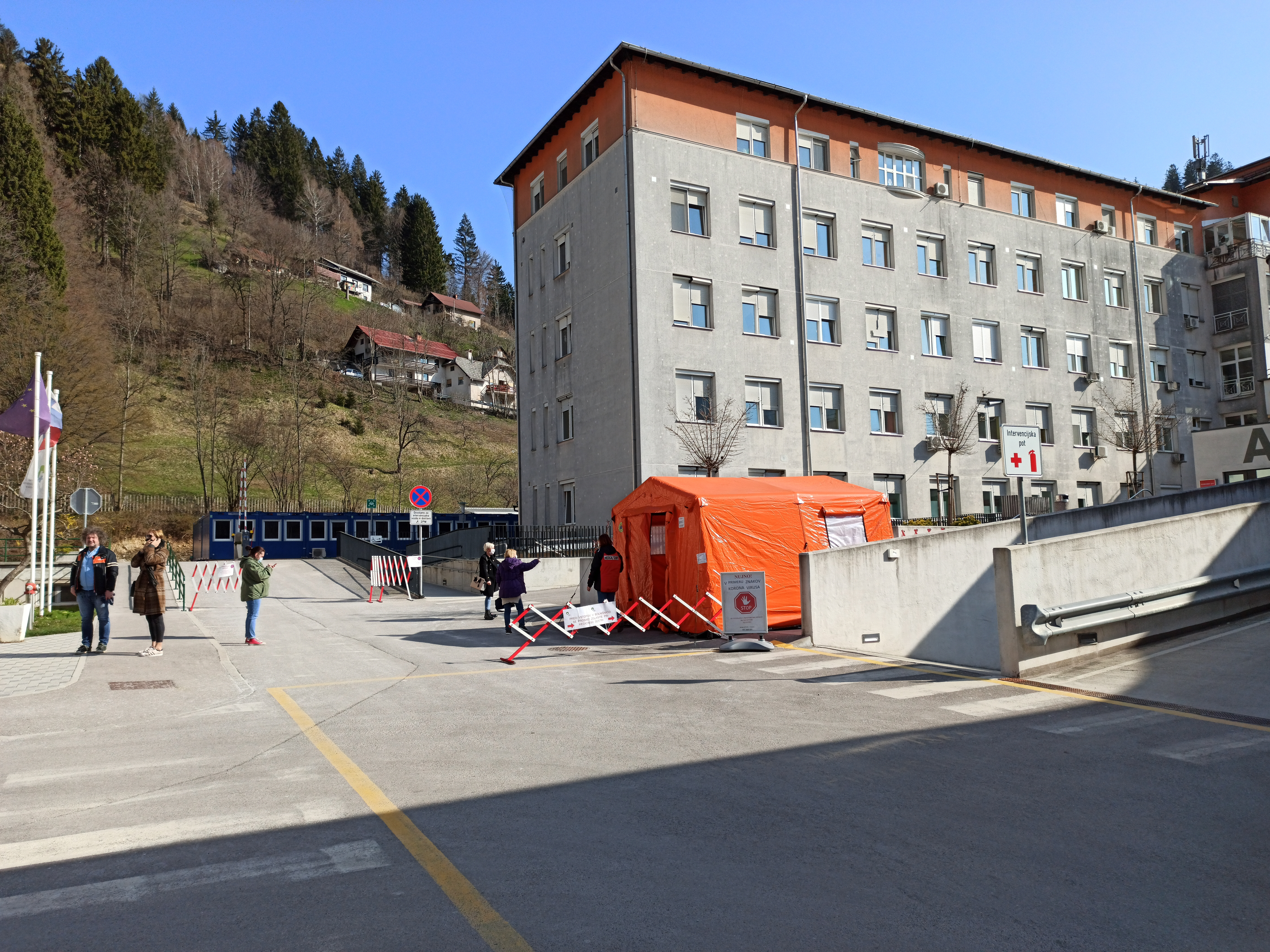 Splošna bolnišnica Jesenice - Pregrajen vhod v blok A SBJ v času pandemije Covid-19